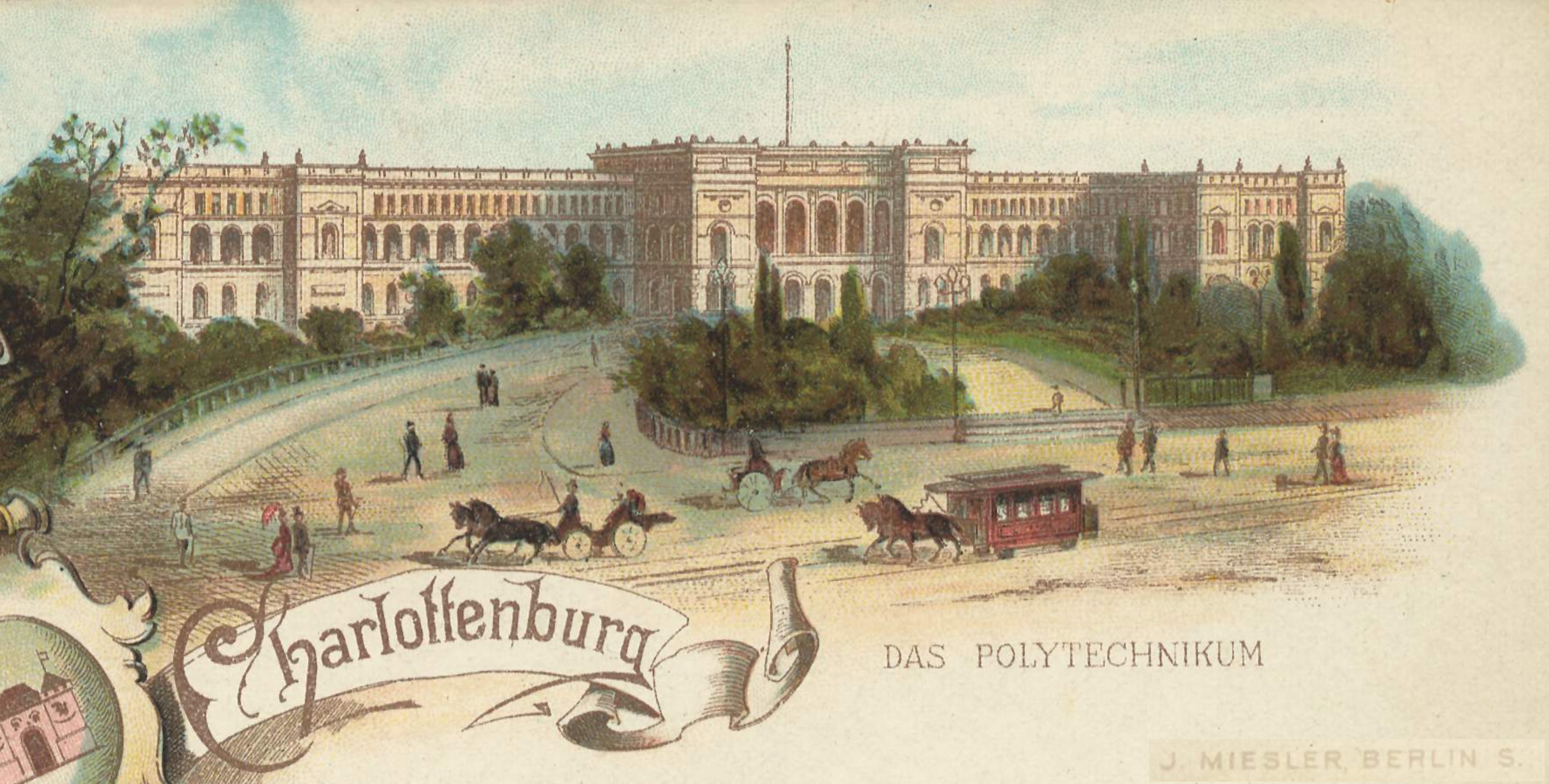 Technische Hochschule (heute Technische Universität) in Berlin-Charlottenburg